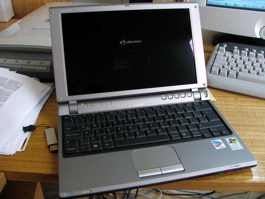 Instalando Ubuntu Dapper en un Vaio VGN-T330FP.